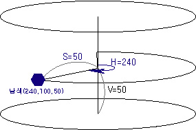 Navy_on_hsv_cylinde